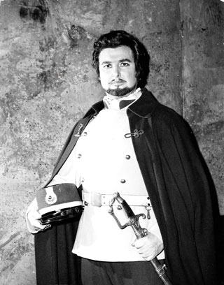 Don Jose